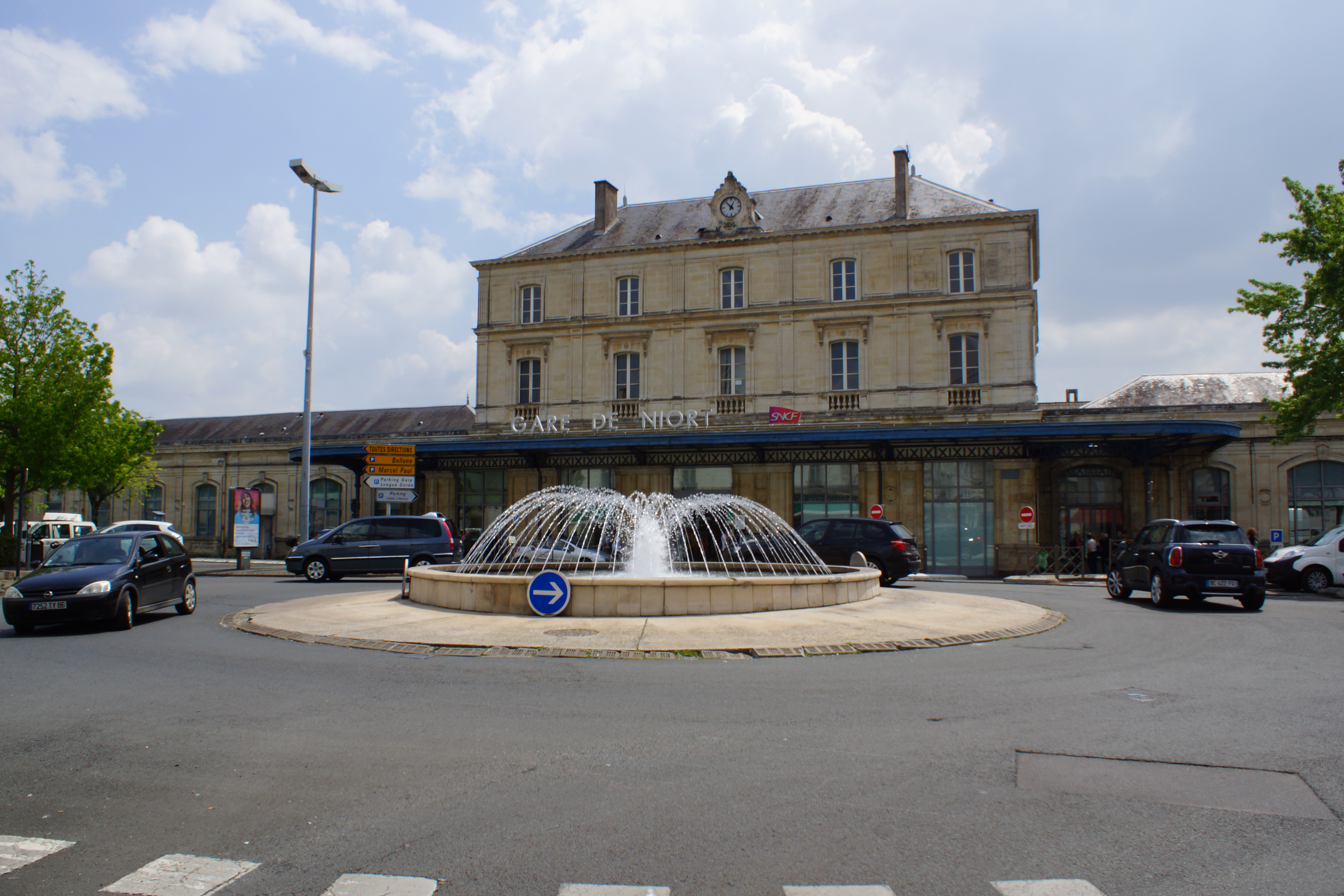 Gare de Niort, le bâtiment voyageurs et l'entrée de la gare.